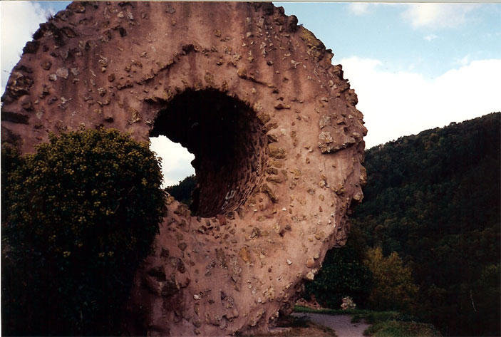 Le donjon circulaire du château d'Engelsbourg a bascule, une "rondelle" s'est posée sur la tranche et forme un anneau dressé baptisé du surnom populaire d' "oeil de la sorciere". Le fait de voir cet élément se maintenir encore aujourd'hui témoigne de la qualité des mortiers utilisés à cette période du Moyen Age. (The Witch's Eye) - part of the ruined Engelbourg Castle, Thann (Haut-Rhin, France).